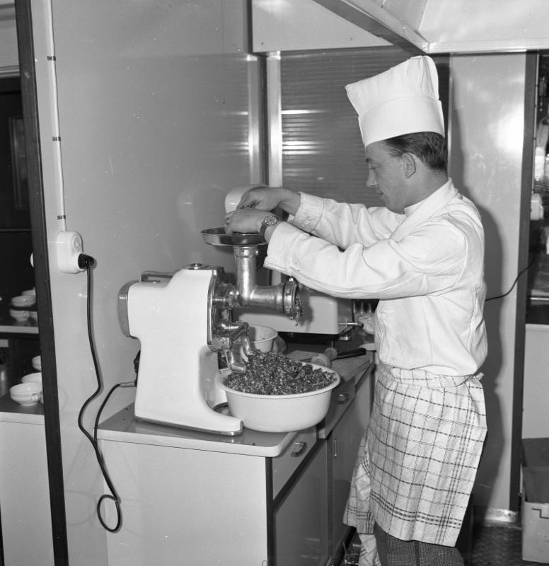 Fahrt des Motorschiffes "Europa" der Köln-Düsseldorfer Gesellschaft von Köln nach Düsseldorf Information added by Wikimedia users.